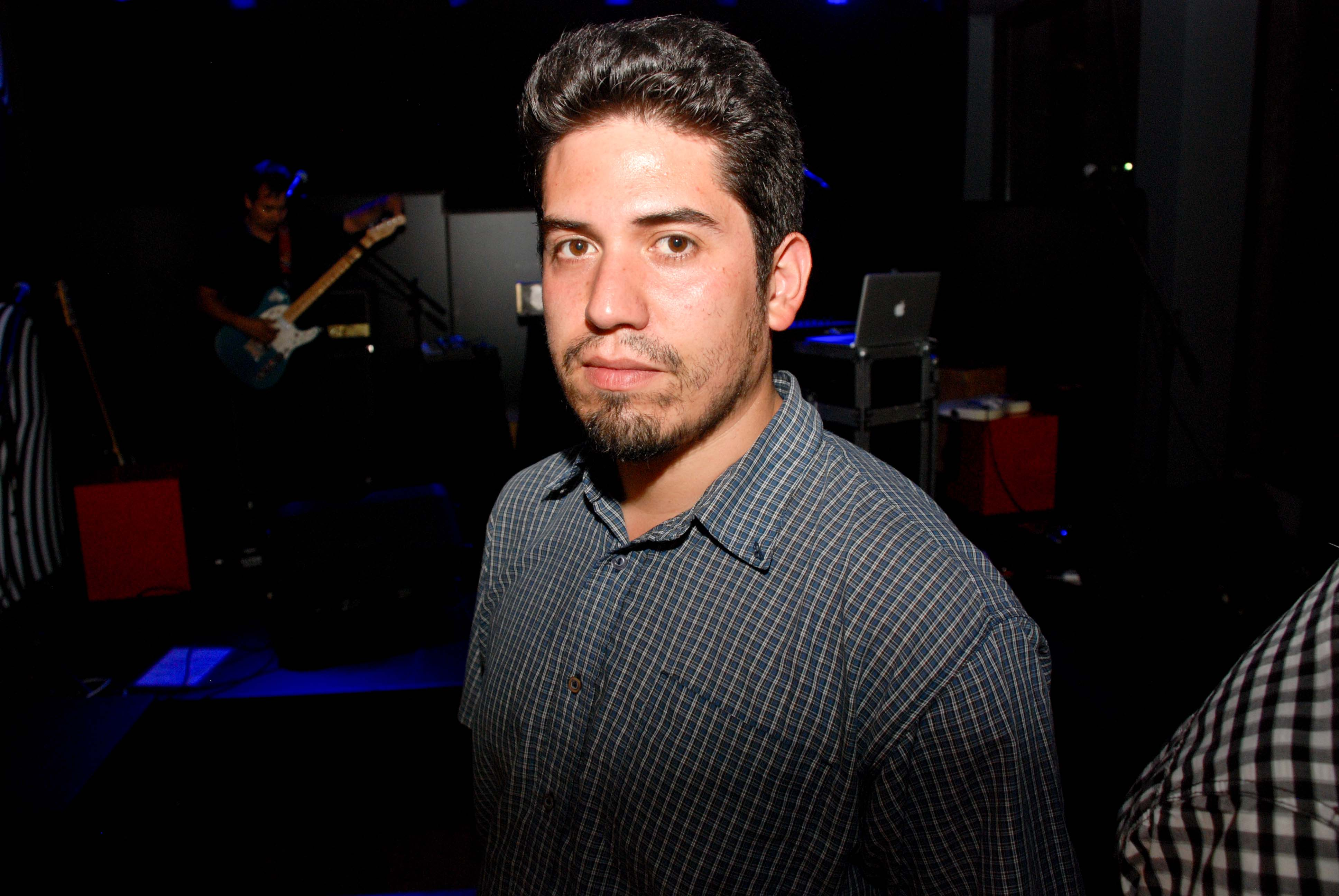 Rodrigo Santis, vocalista de Congelador y Caravana.